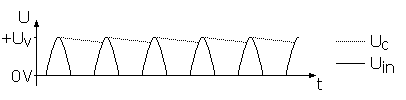 Figuur voor het verduidelijken van het nut en werking van een afvlakcondensator.